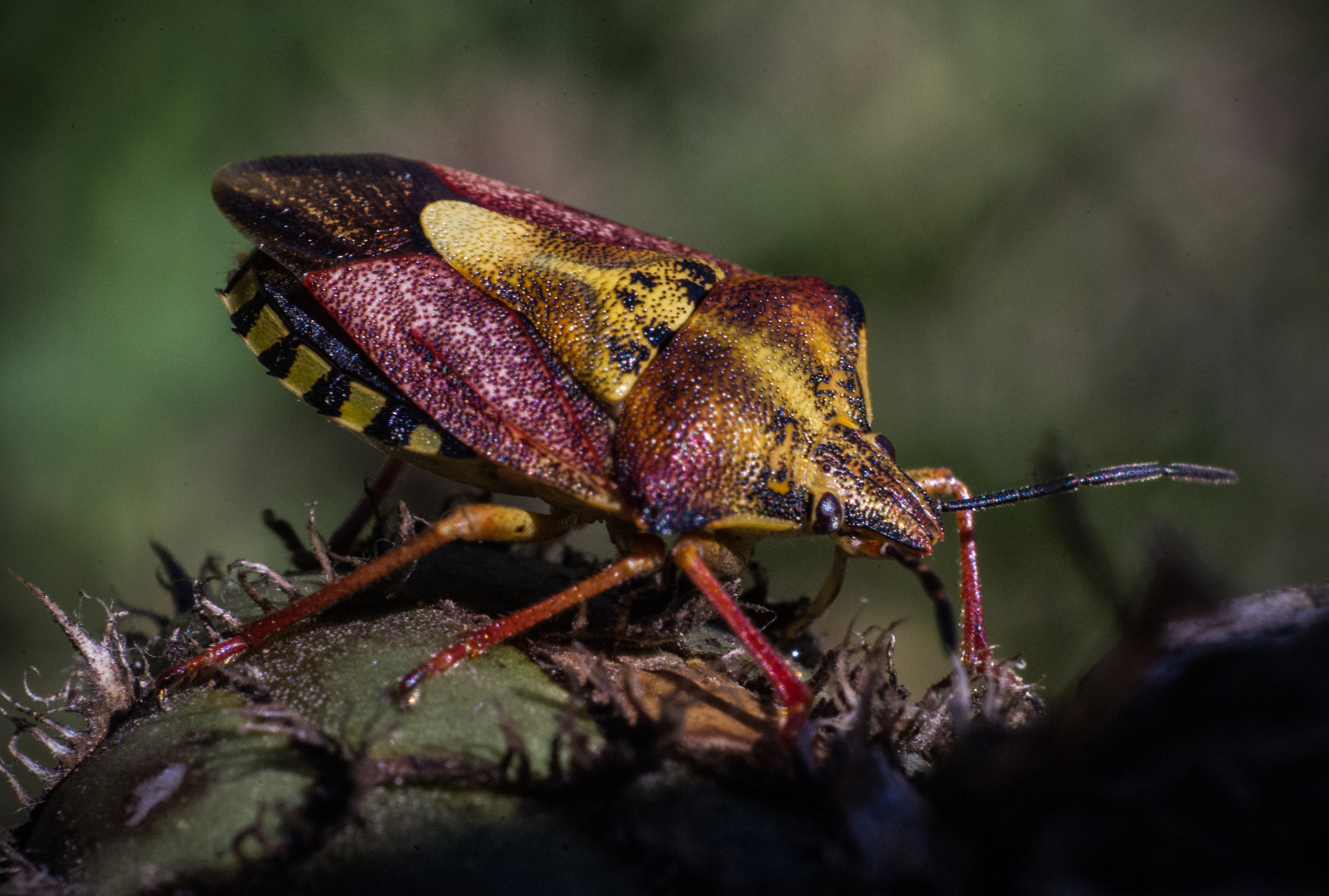 Saint-Etienne-en-Quint, Drôme, France